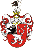 Znak města Žebrák